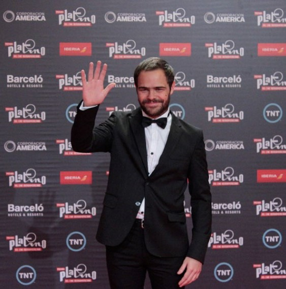 Juan Pedro Lanzani en los Premios Platino 2016.